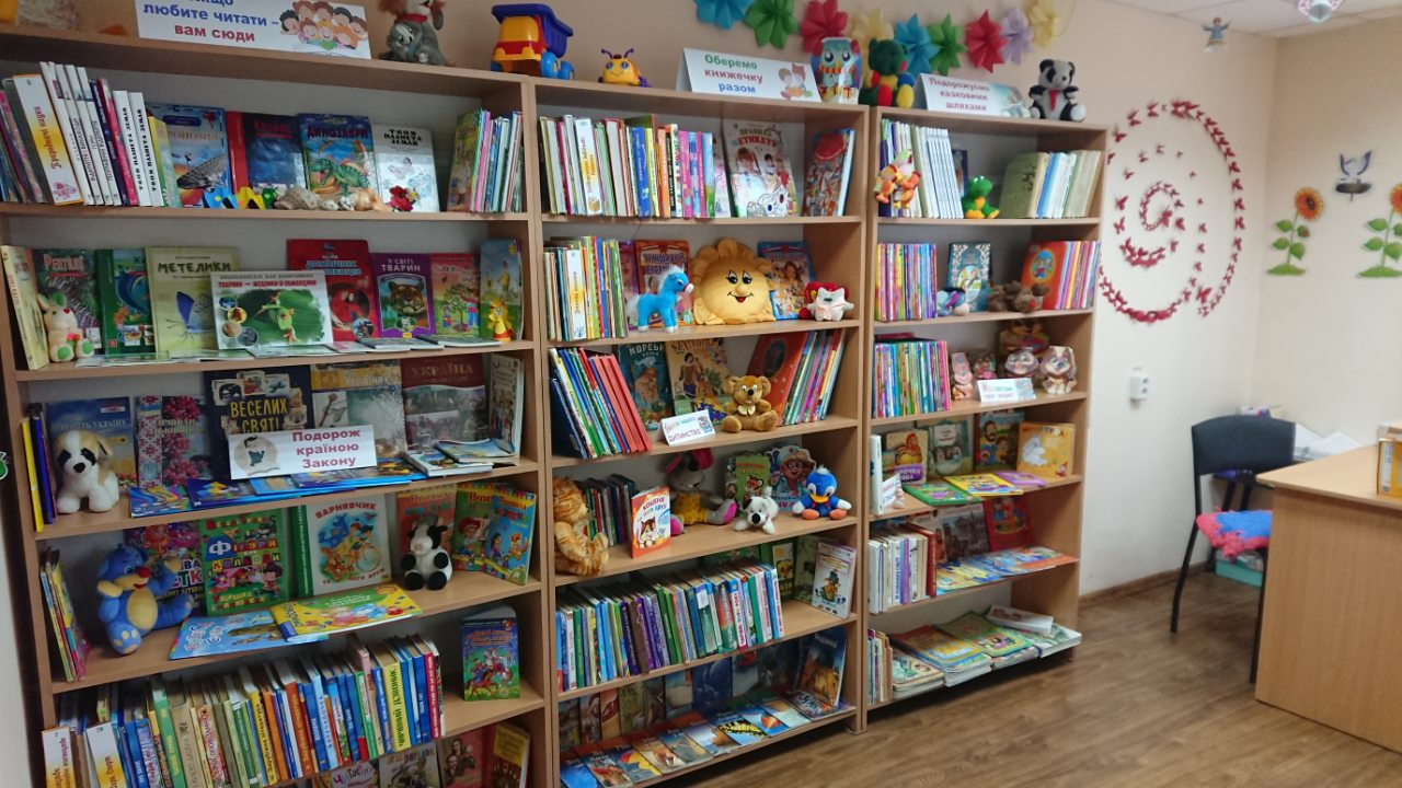 Стелажі з яскравими книгами та іграшками для дітей